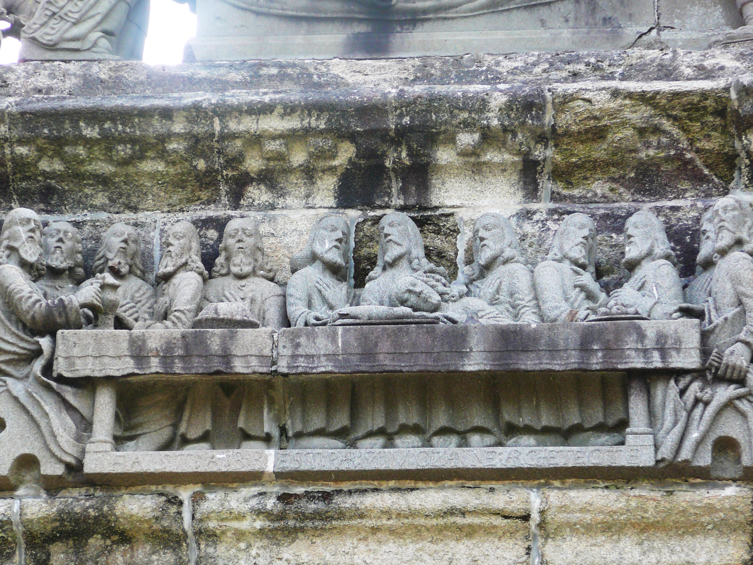 Pleyben: le calvaire, la Cène